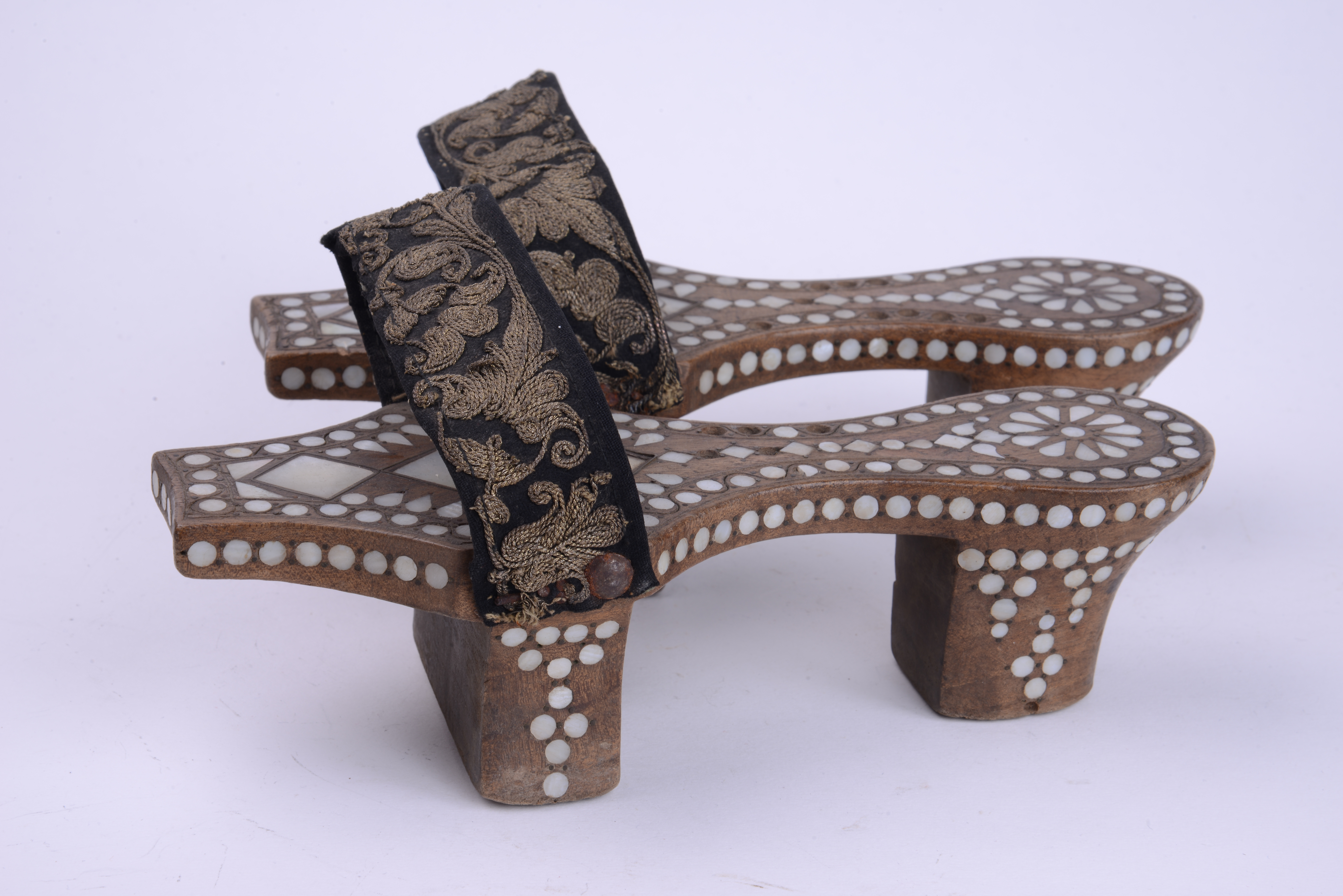 Srpski (latinica): Nanule iz XX veka. Otkup od S. Čičanovića iz Leskovca, 1960. godine. Izrađene su od drveta inkrustacijom sedefa u drvo. Nanule su sa štiklom i kaišem koji je od tekstila na kome su biljni ornamenti. Ovaj kaiš nije pripadao ovim nanulama, naknadno je stavljen a prvobitni je bio od kože. Deo su zbirke primenjene umetnosti.